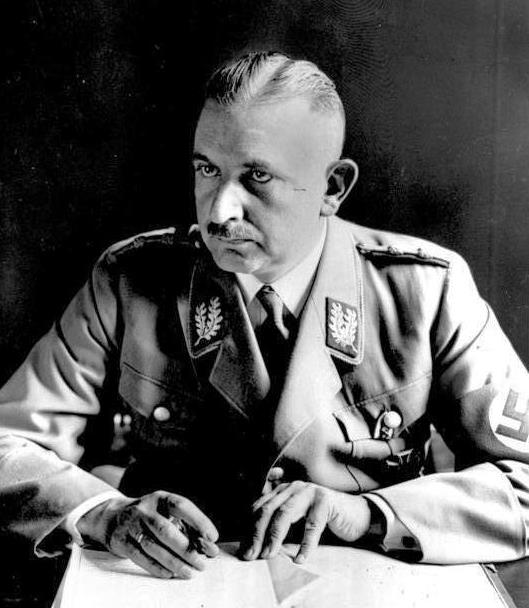 Porträt von Bernhard Rust